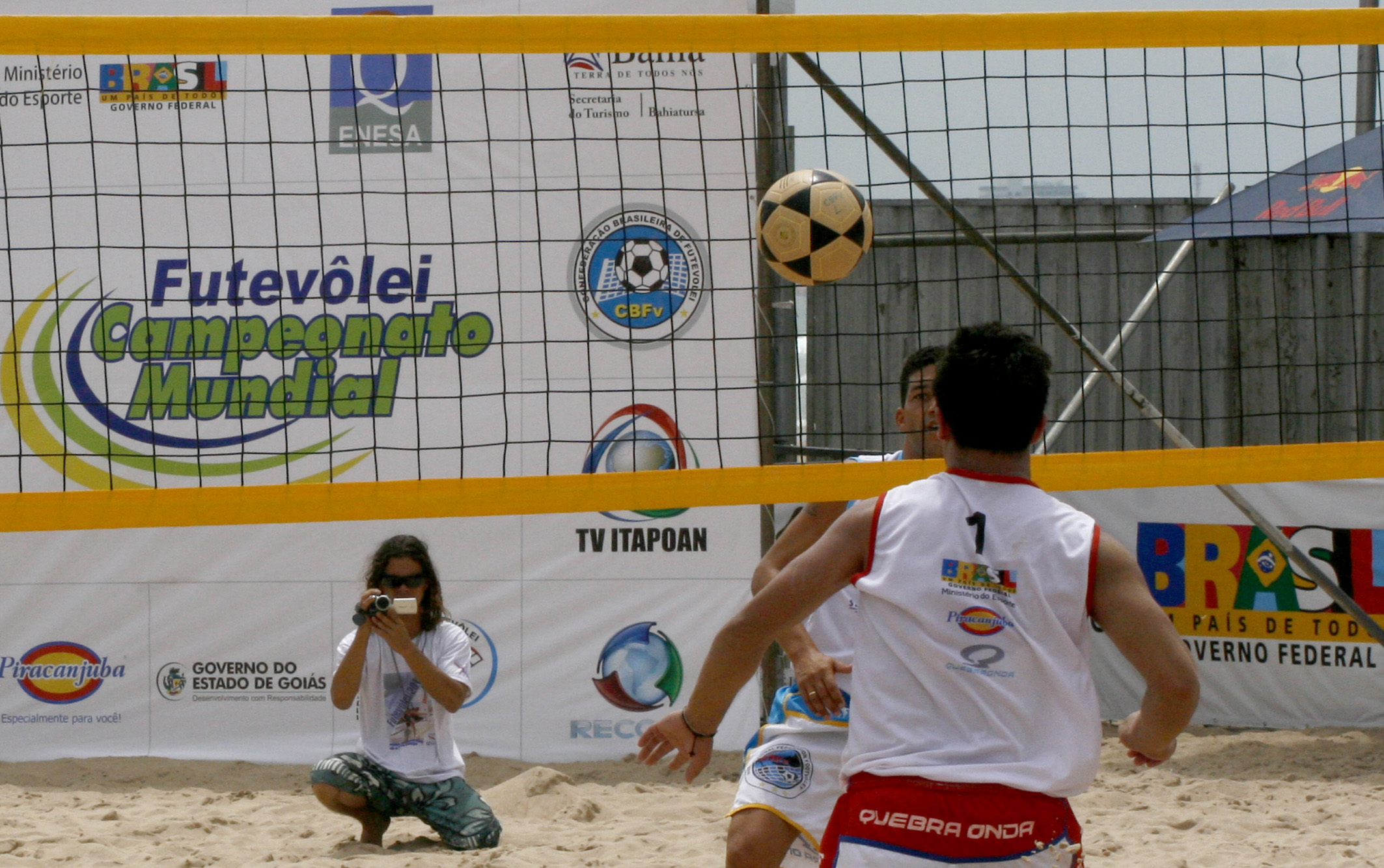 Governador Jaques Wagner participa da final do Futevôlei Foto: Roberto Viana/AGECOM